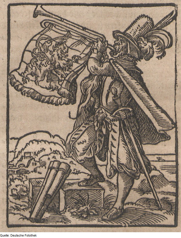 Original image description from the Deutsche Fotothek Ständebuch & Beruf & Ausrufer